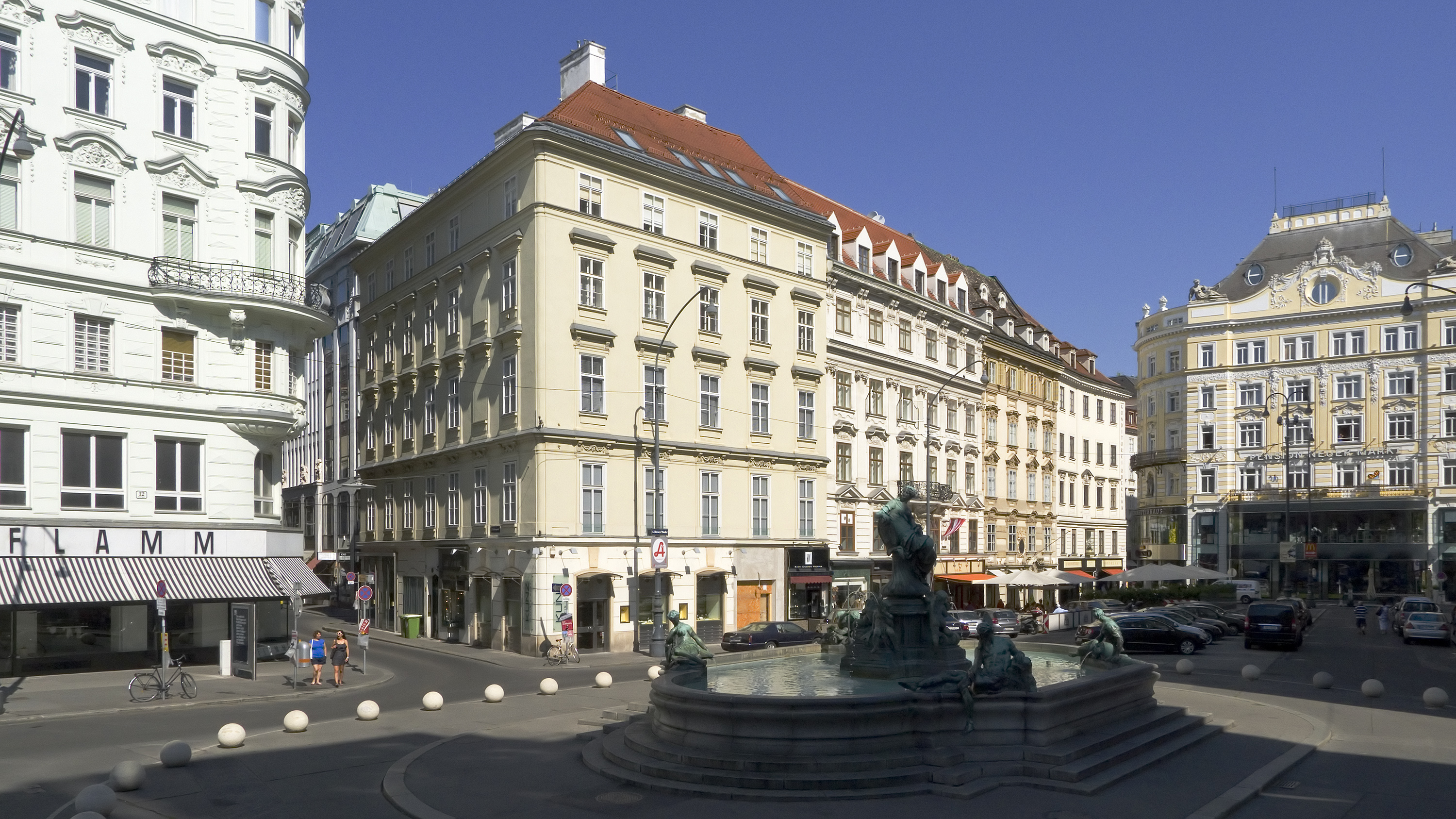 Neuer Markt in Wien 1 bei Nr. 4 Richtung Norden